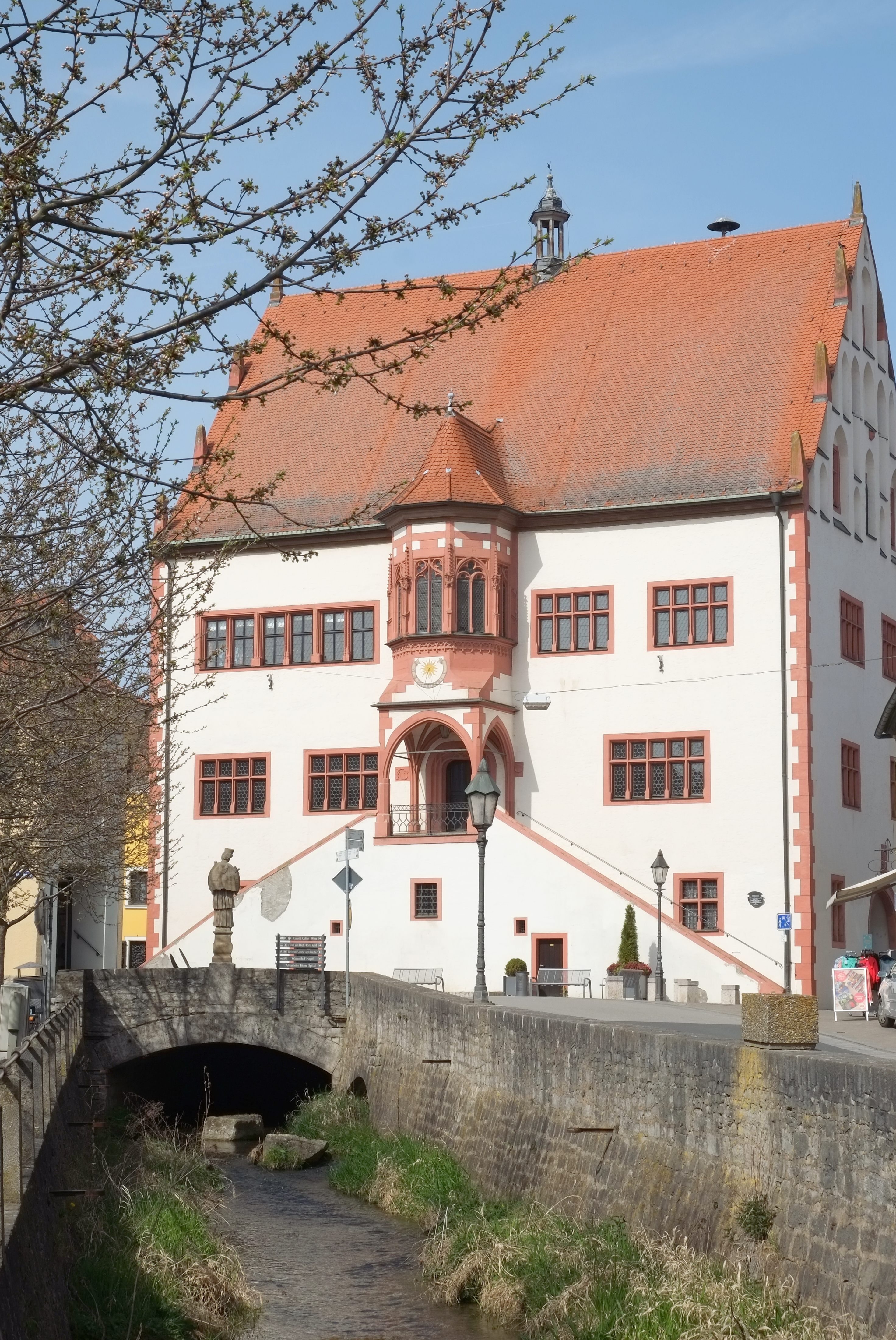 Rathaus in Dettelbach im Landkreis Kitzingen (Bayern, Deutschland)